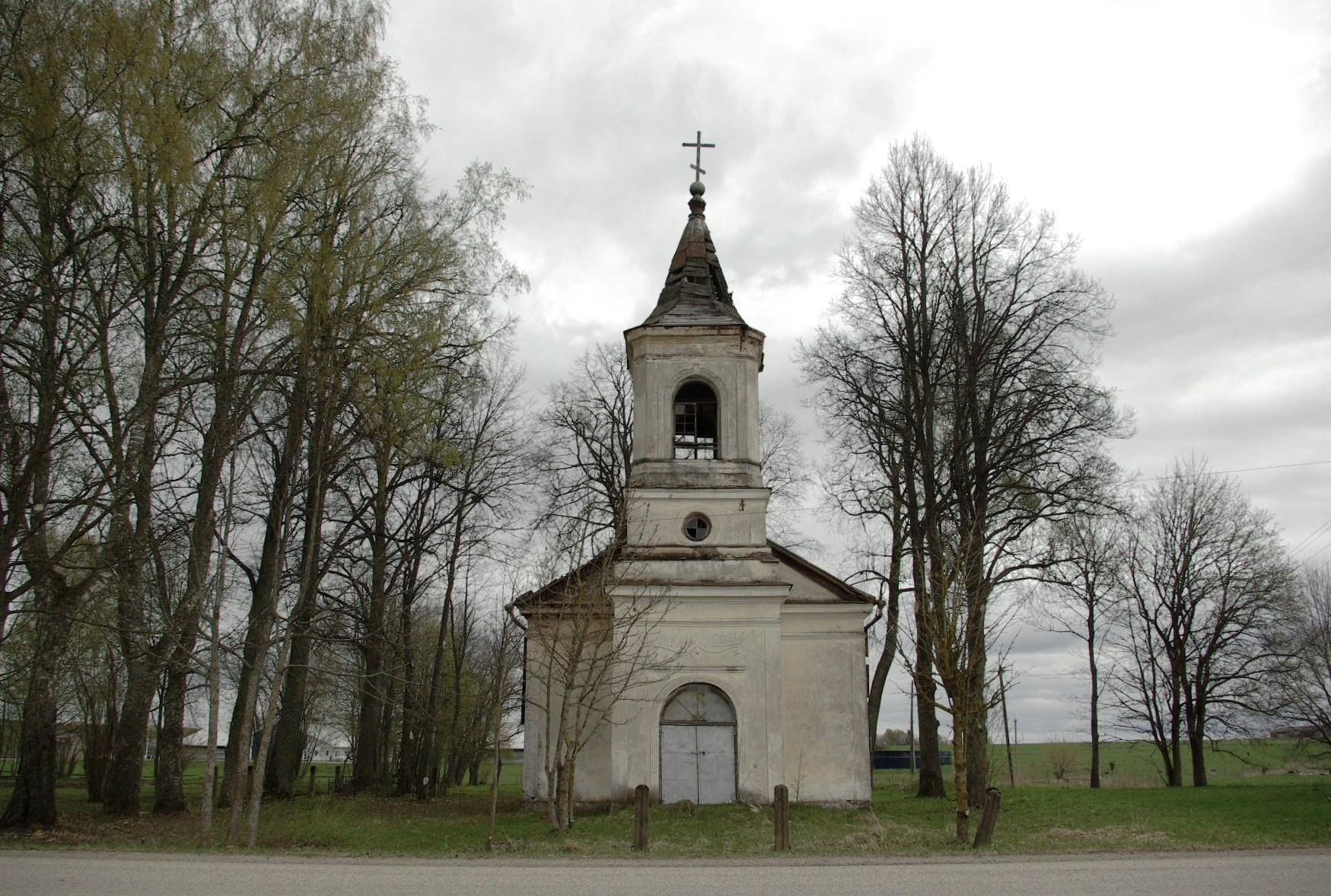 Laatre Pühavaimu kirik